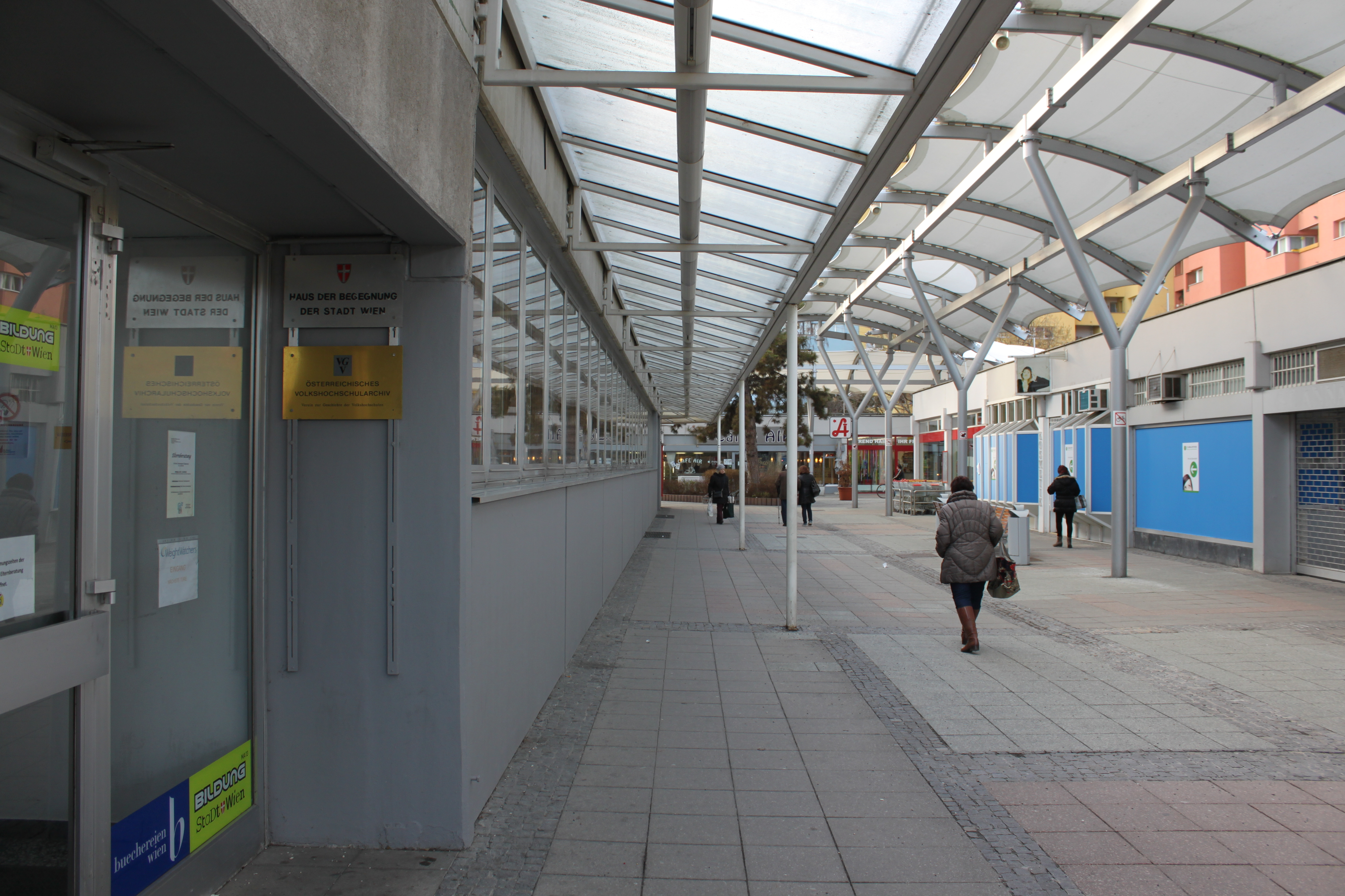 Gedeckter Bereich vor dem Volkshochschularchiveingang in der Großfeldsiedlung in Floridsdorf